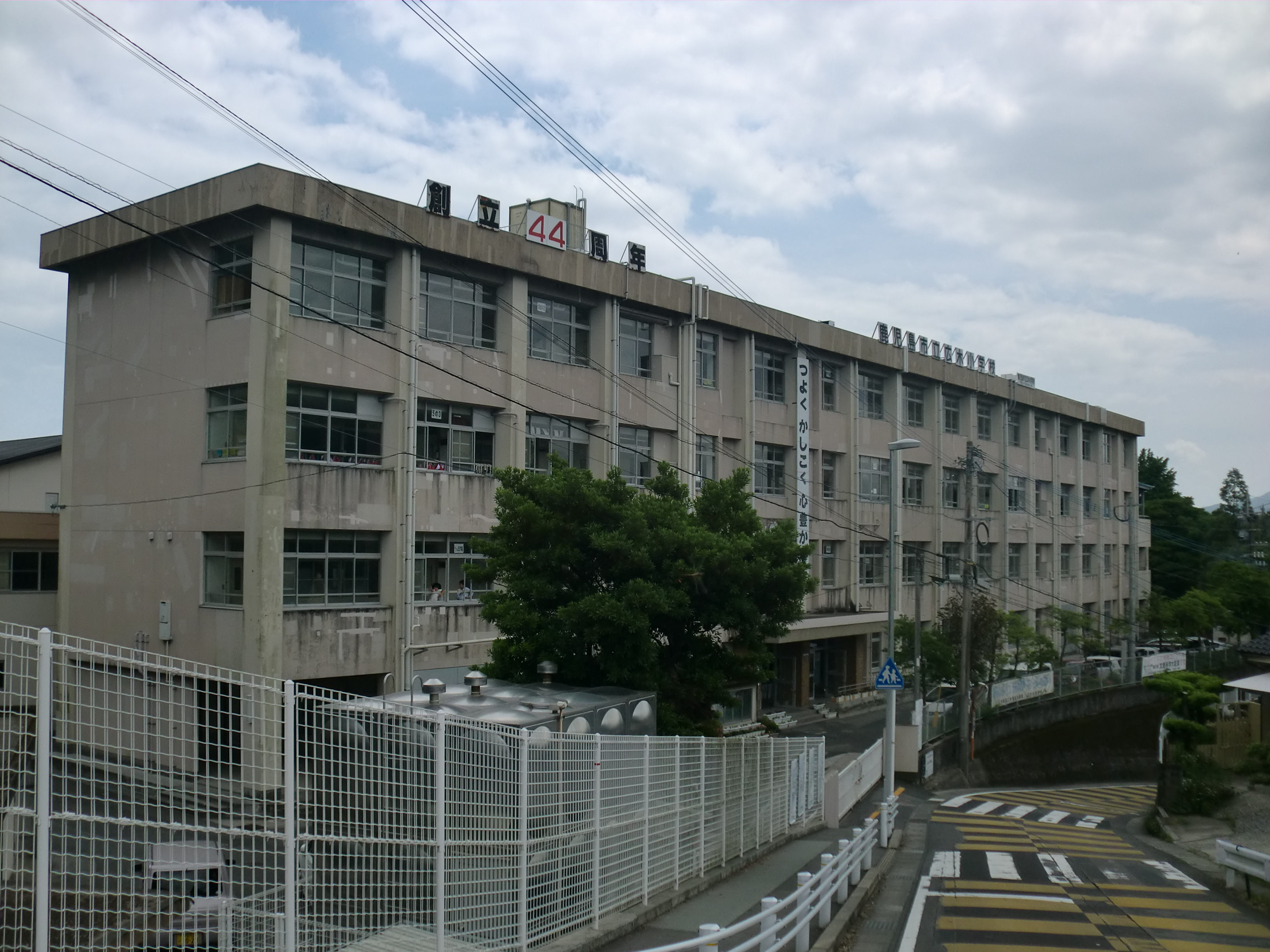 鹿児島市にある鹿児島市立広木小学校